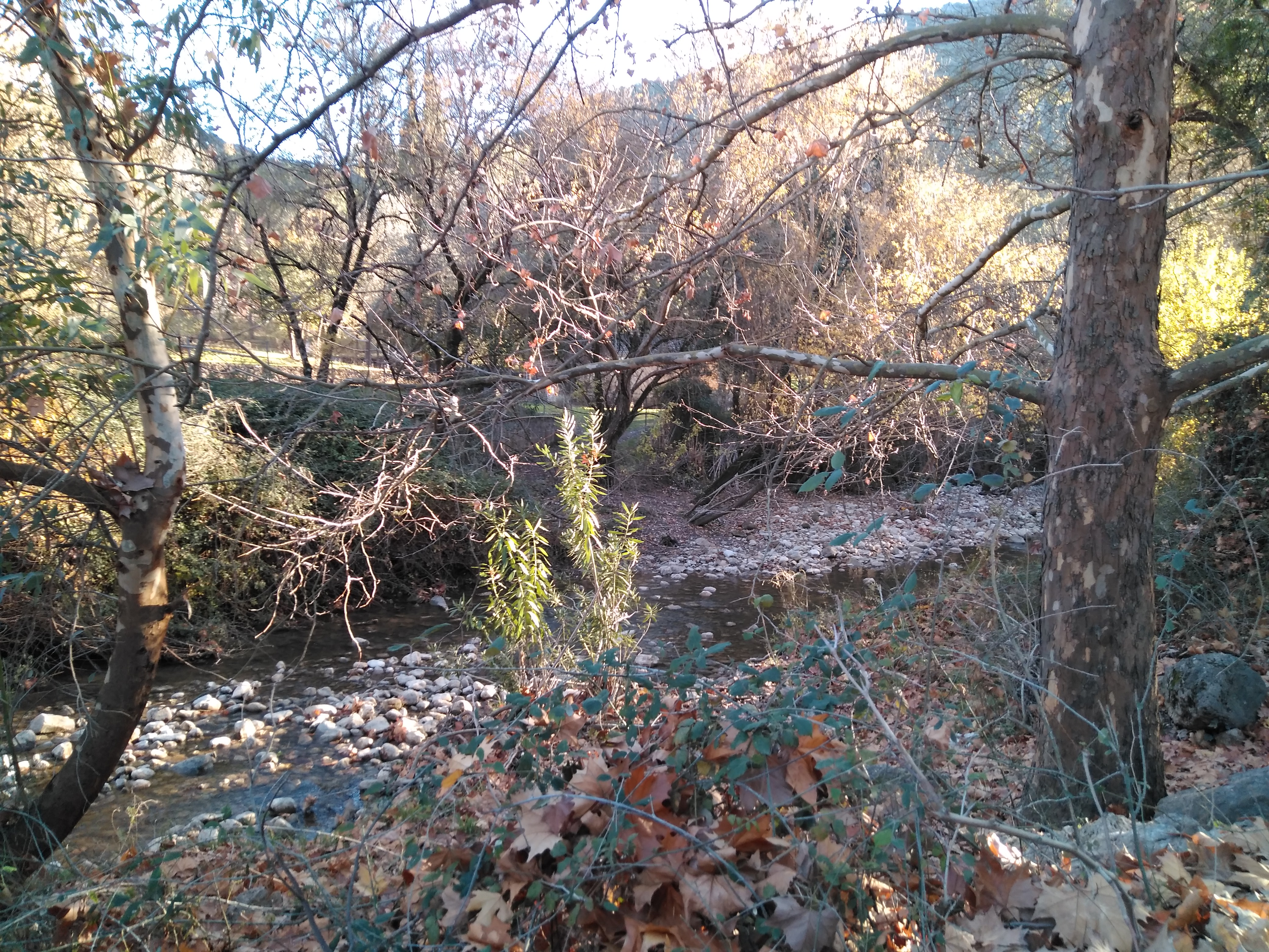 Río Tavizna junto al camping. Ubrique, España